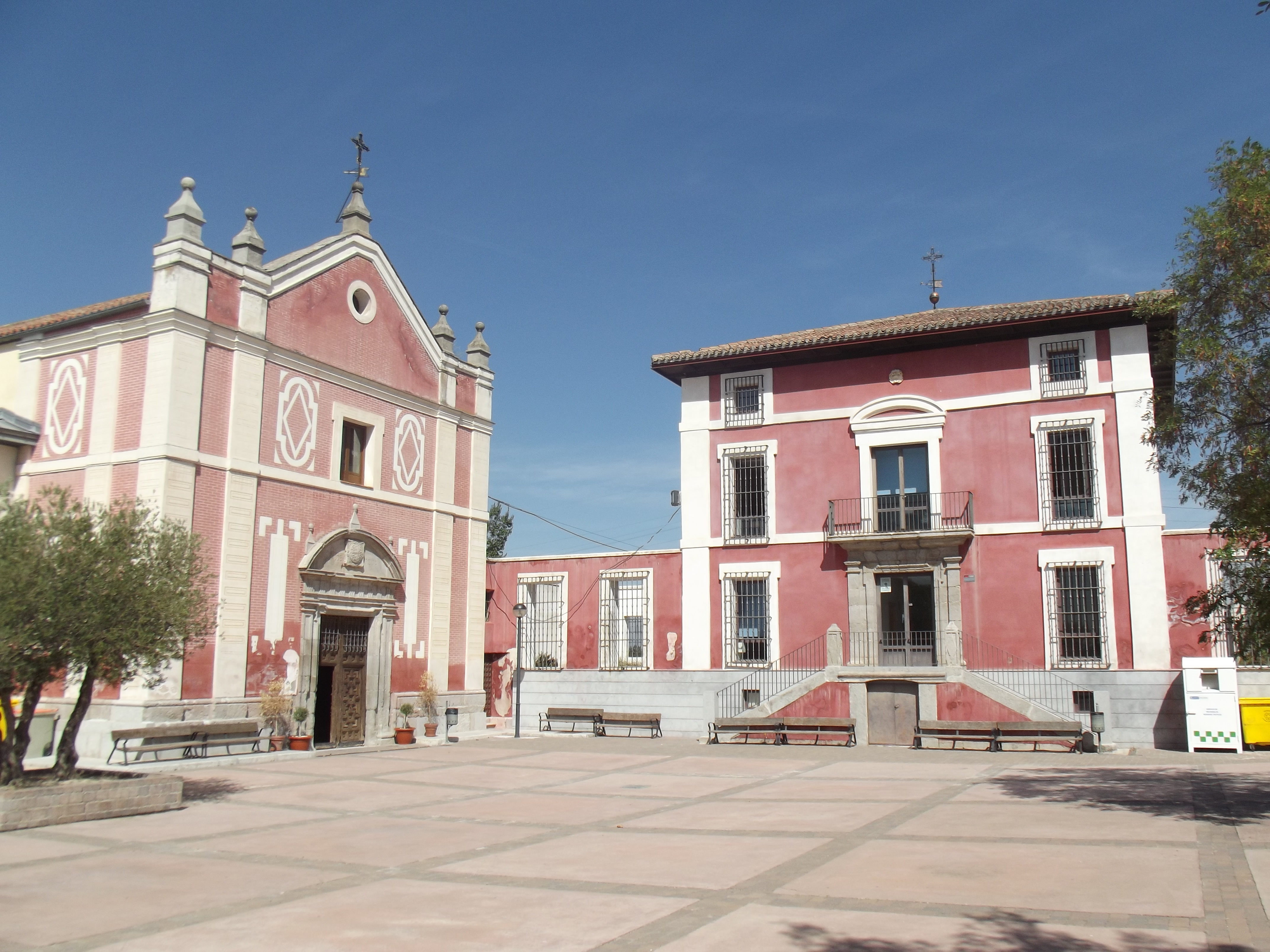 Ermita de Valverde, situada en el barrio de Fuencarral